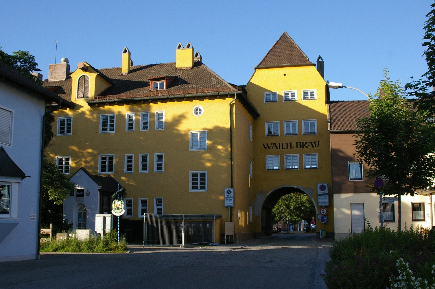 Dorfen, Markt, Isener Tor.